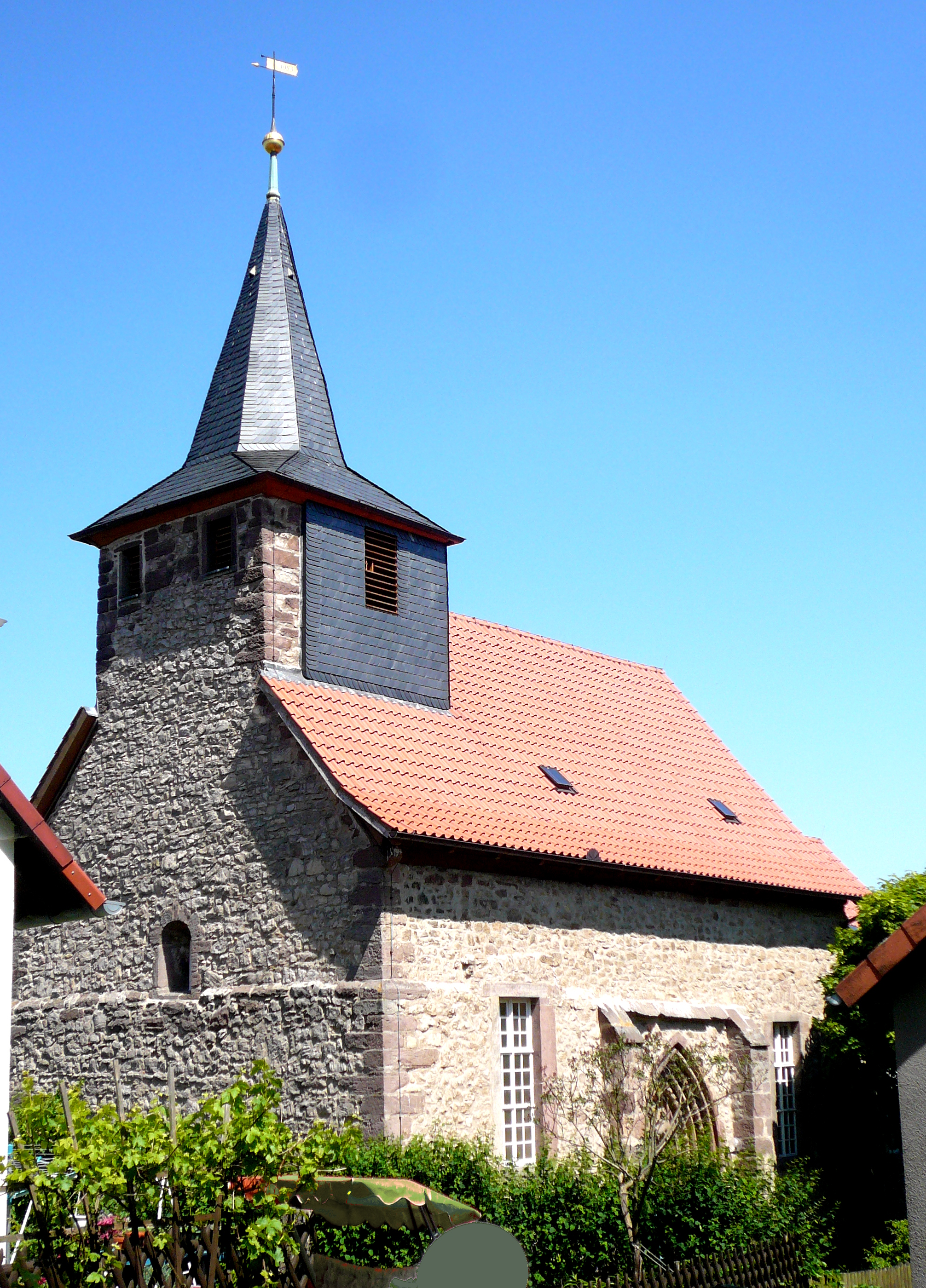 Evangelische Kirche in Friedland-Deiderode von Süden. Gotische Saalkirche, 15. Jahrhundert, in Kalk- und Sandbruchsteinen mit Eckquaderung und Gewänden aus Sandsteinquadern.